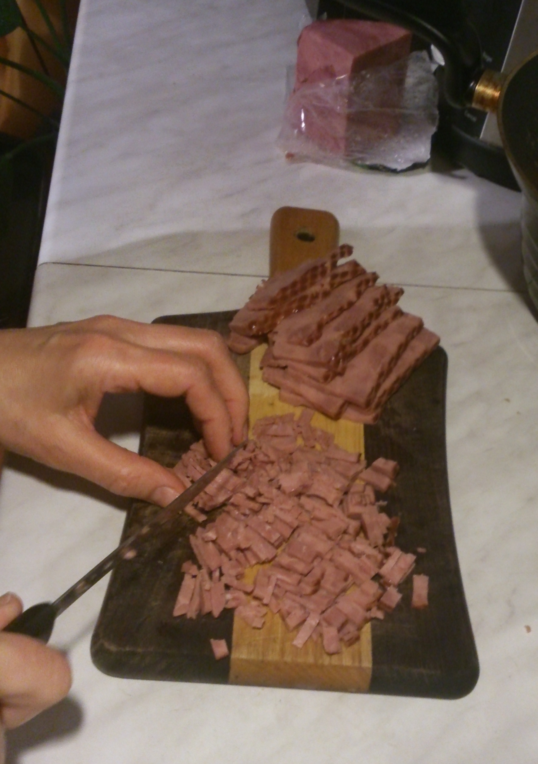 Singi hakkimine oasalati jaoks